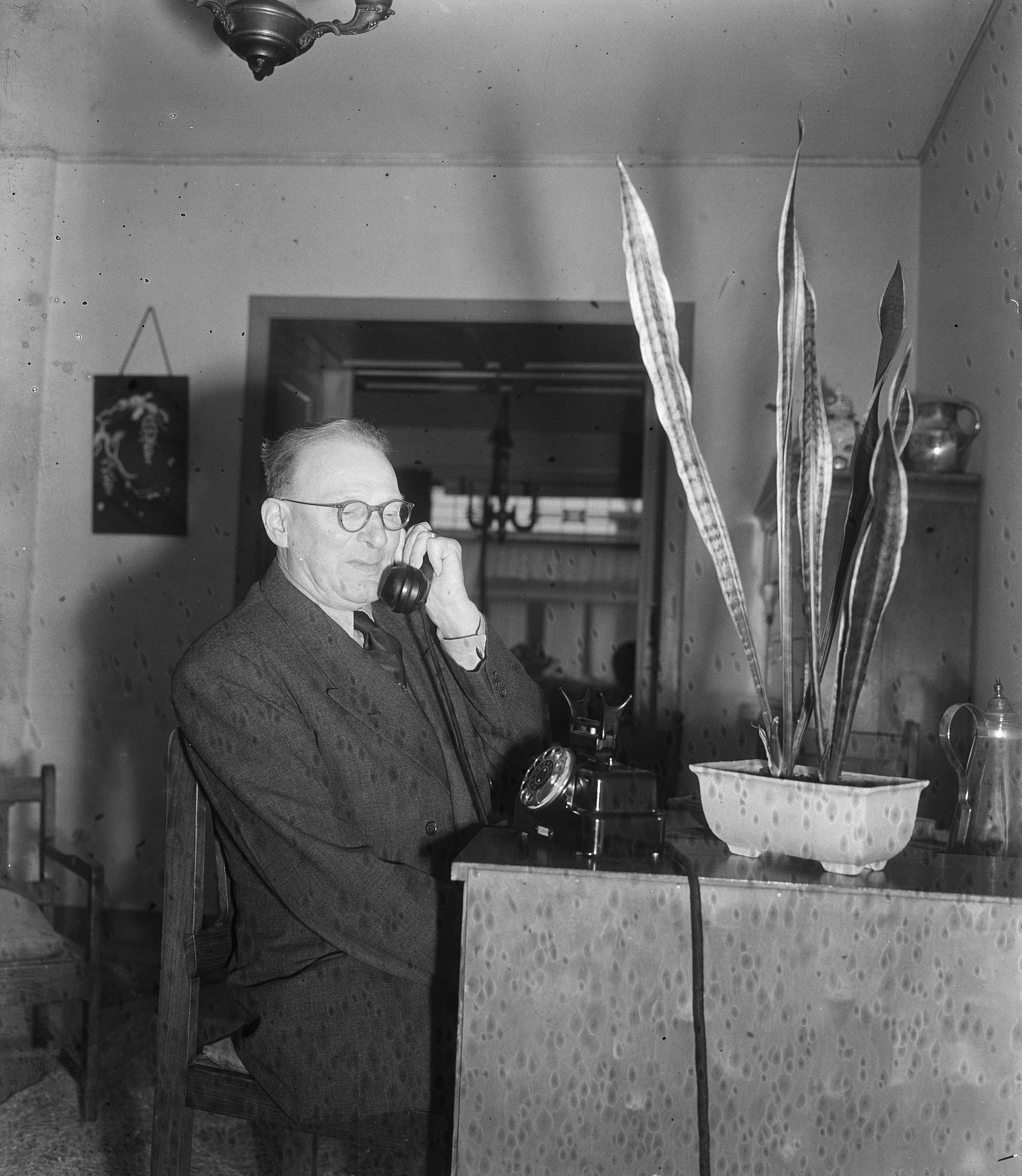 Collectie / Archief : Fotocollectie Anefo Reportage / Serie : [ onbekend ] Beschrijving : Joris van den Berg 70 jaar Datum : 16 februari 1952 Persoonsnaam : Joris van den Berg Fotograaf : Duinen, […] van / Anefo Auteursrechthebbende : Nationaal Archief Materiaalsoort : Glasnegatief Nummer archiefinventaris : bekijk toegang 2.24.01.09 Bestanddeelnummer : 904-9716